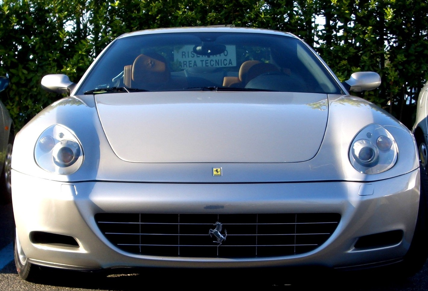 Ferrari 612 Scaglietti